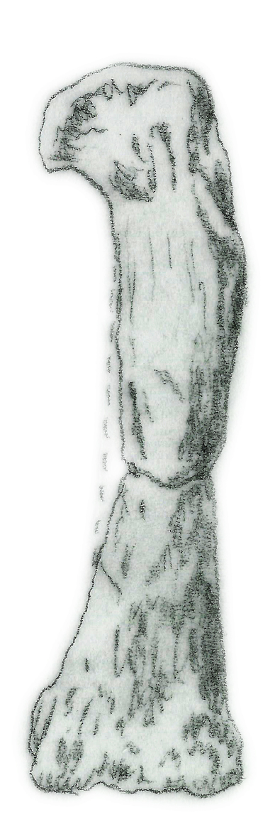 Illustration of a fossil of Camelotia